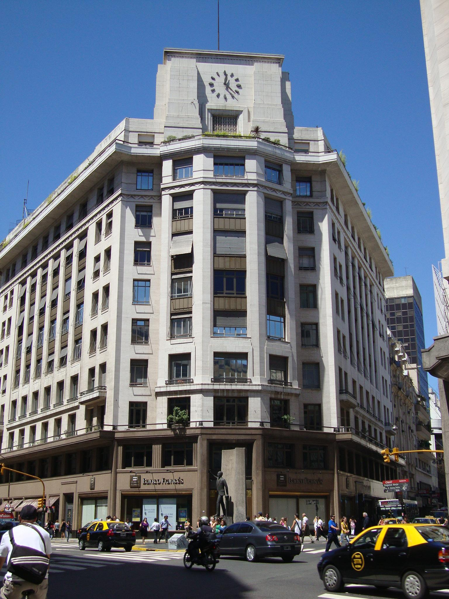 Edificio construido como sede de la compañía petrolera Shell-Mex en Buenos Aires. Diagonal Norte, esquina Perón y Esmeralda.